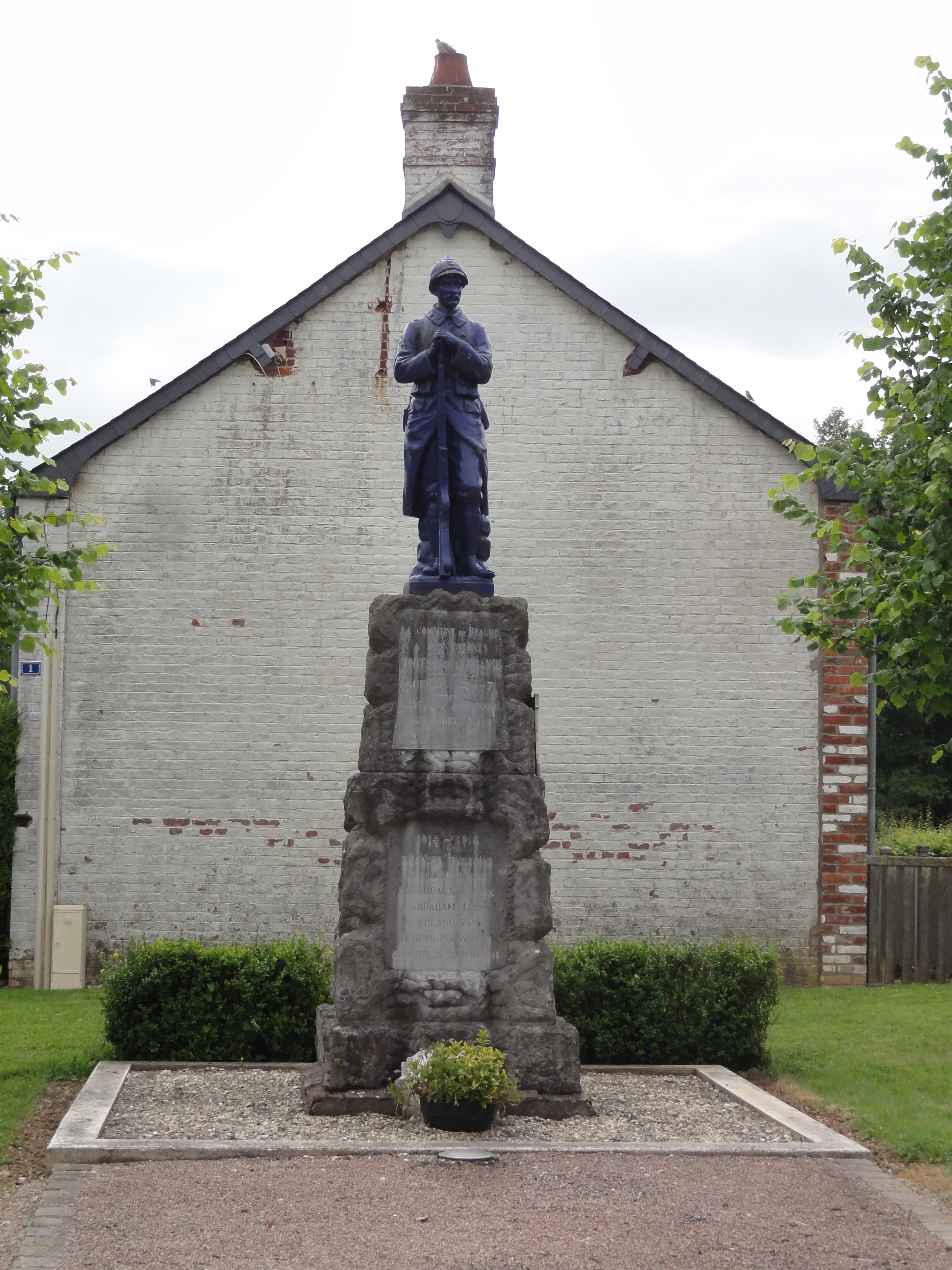 Beaumé (Aisne) monument aux morts